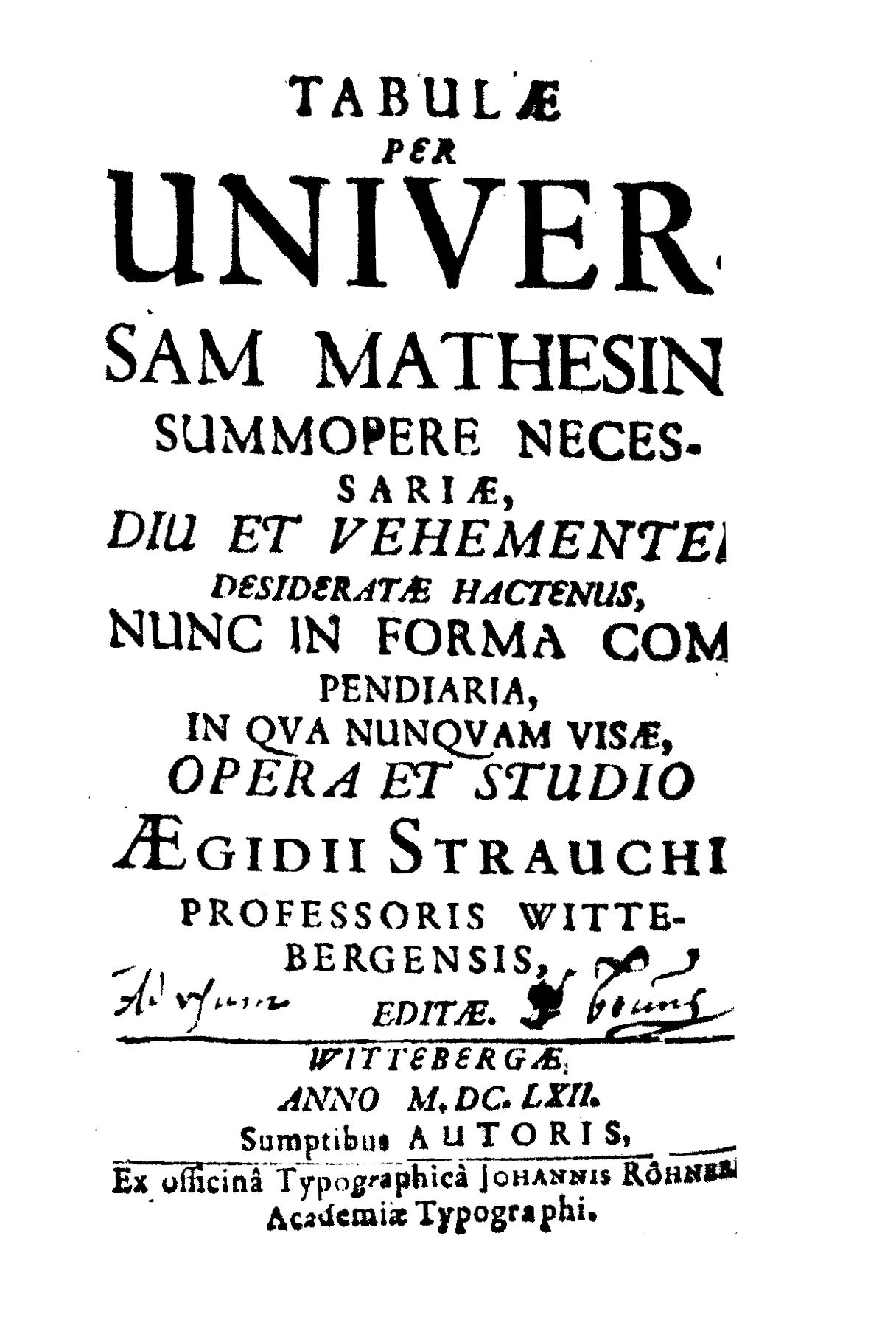 Tabulae per universam mathesin summopere necessariae, … nunc in forma compendiaria, in qua nunquam visae, opera et studio Aegidii Strauchi professoris Wittebergensis, editae. - Wittebergae : sumptibus autoris : ex officina typographica Johannis Röhneri, 1662. - [38], 551, [1] p. ; 2°. - VD17-23:279524U .